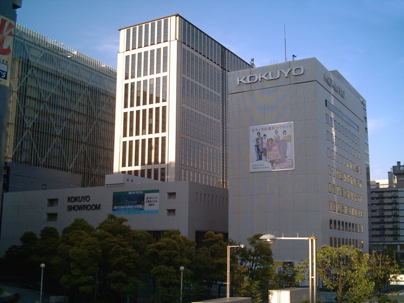 KOKUYO_Sinagawa_Office_Building